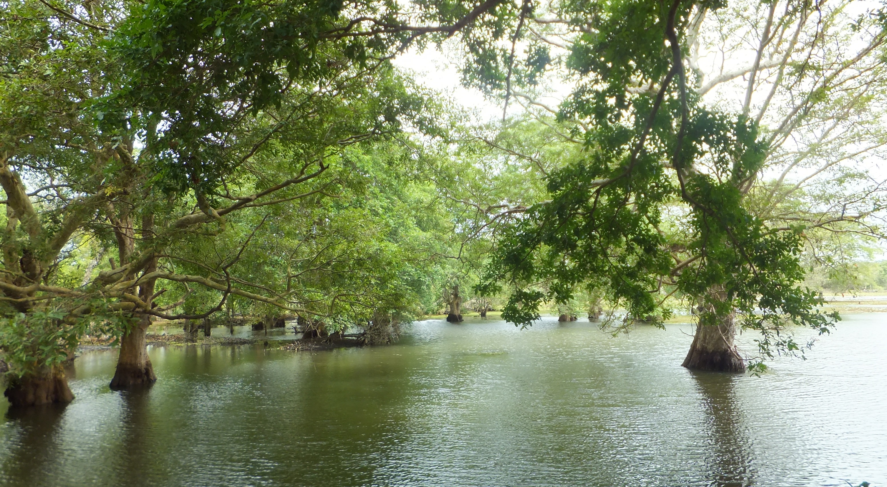 සිංහල: නිල්ලග්ගම වැව